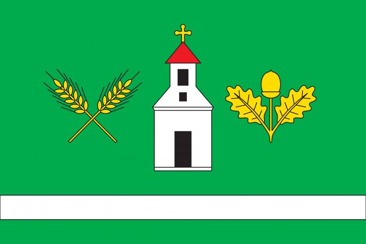 Pavlovice, okres Benešov, vlajka